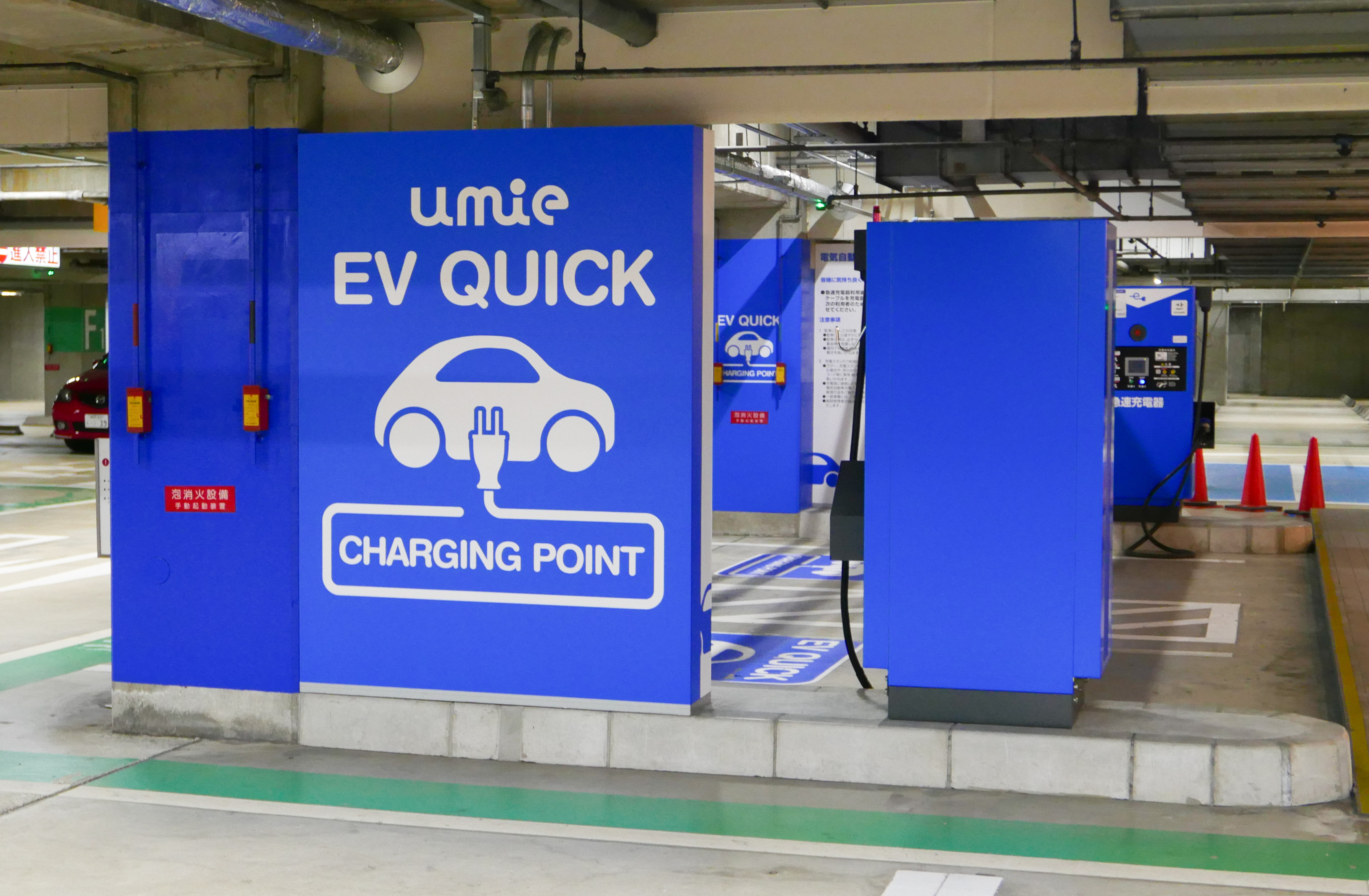 umie 地下駐車場 200V急速充電スポット